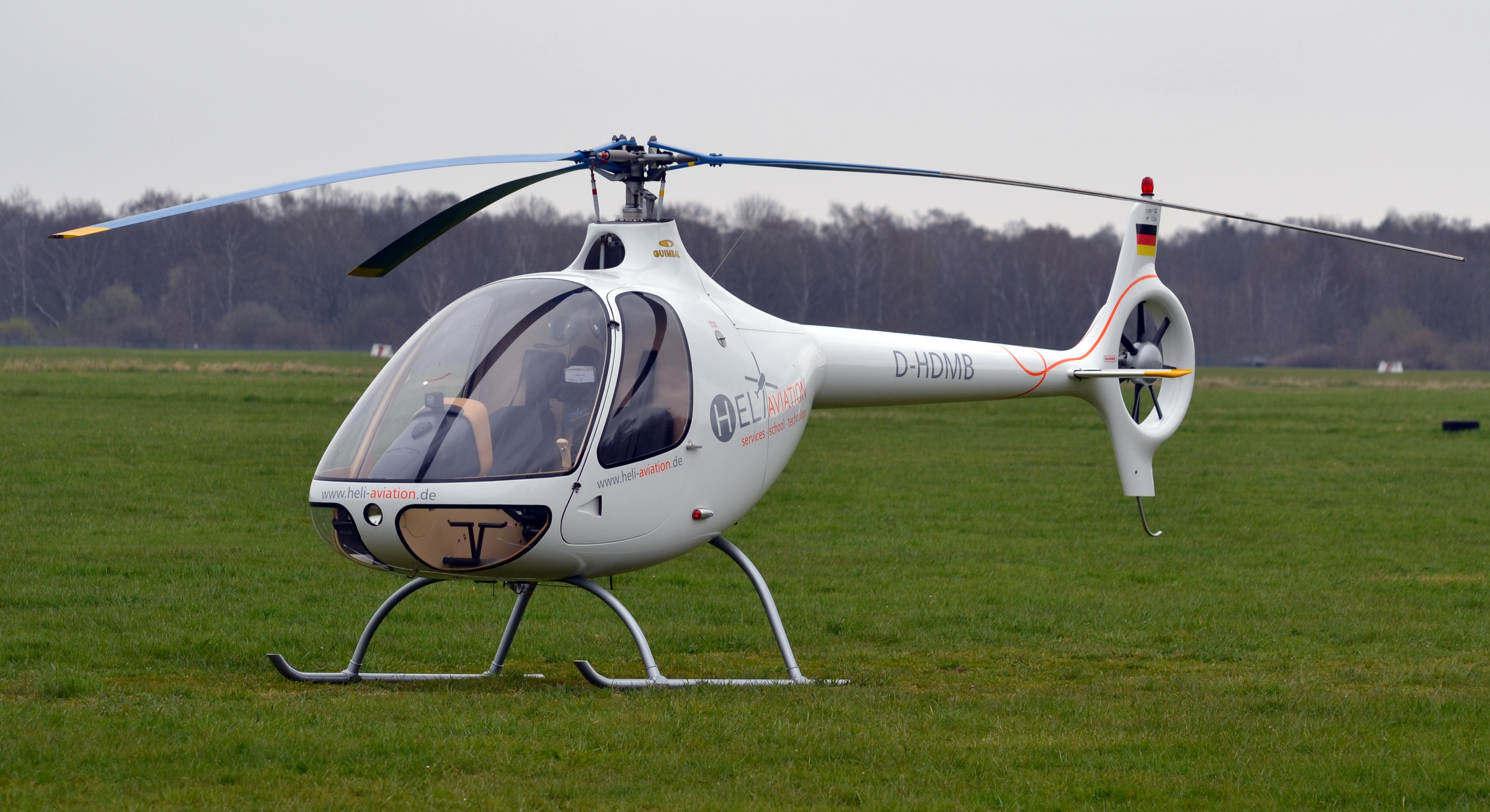 Guimbal Cabri G2 (D-HDMB) auf dem Flugplatz Uetersen